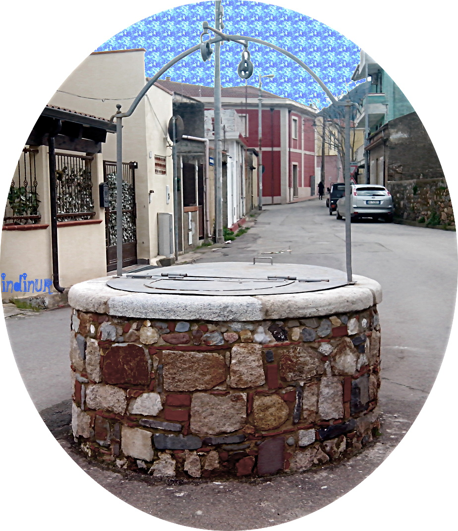 Uno dei tanti pozzi pubblici di Gonnosfanadiga (Via fontana)